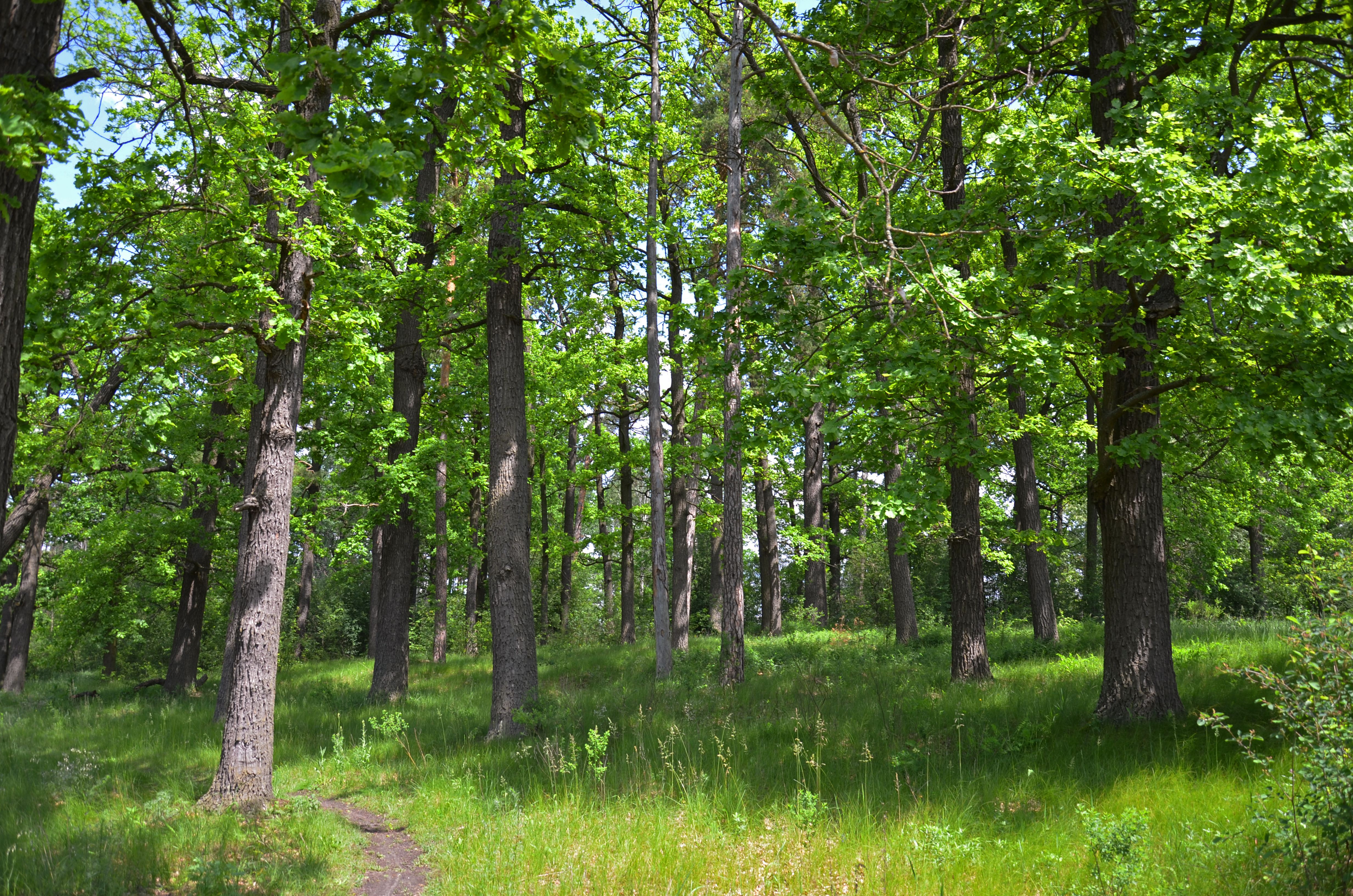 Дубові насадження, Бородянський район, Пісківська селищна рада